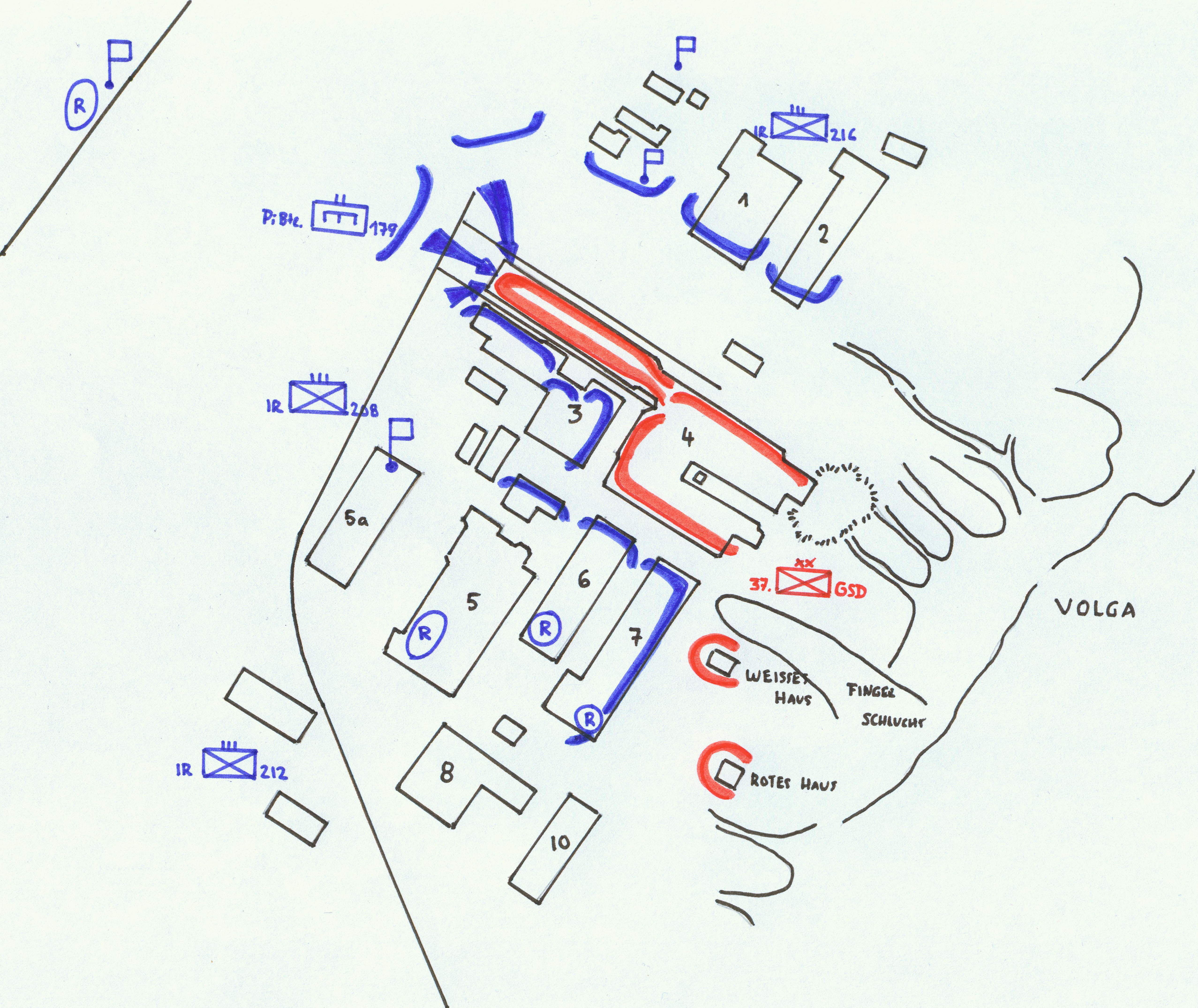 Angriff auf die Martinsofenhalle 3.11.1942 Handskizze